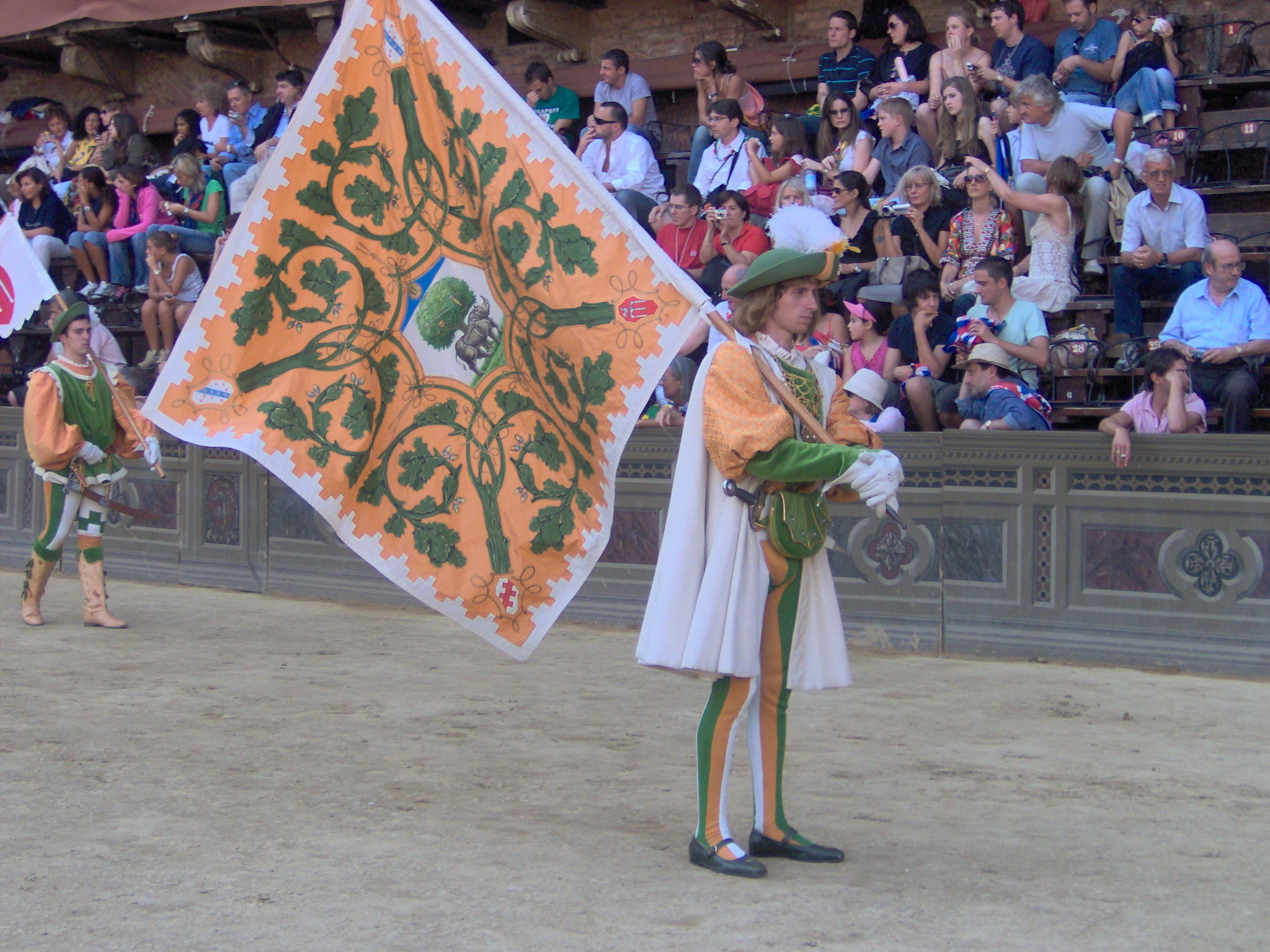 Image Palio dell'Assunta (16/08/2006) - Siena